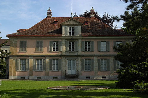 Lindengut in Winterthur (Nr. 03.1-5418)